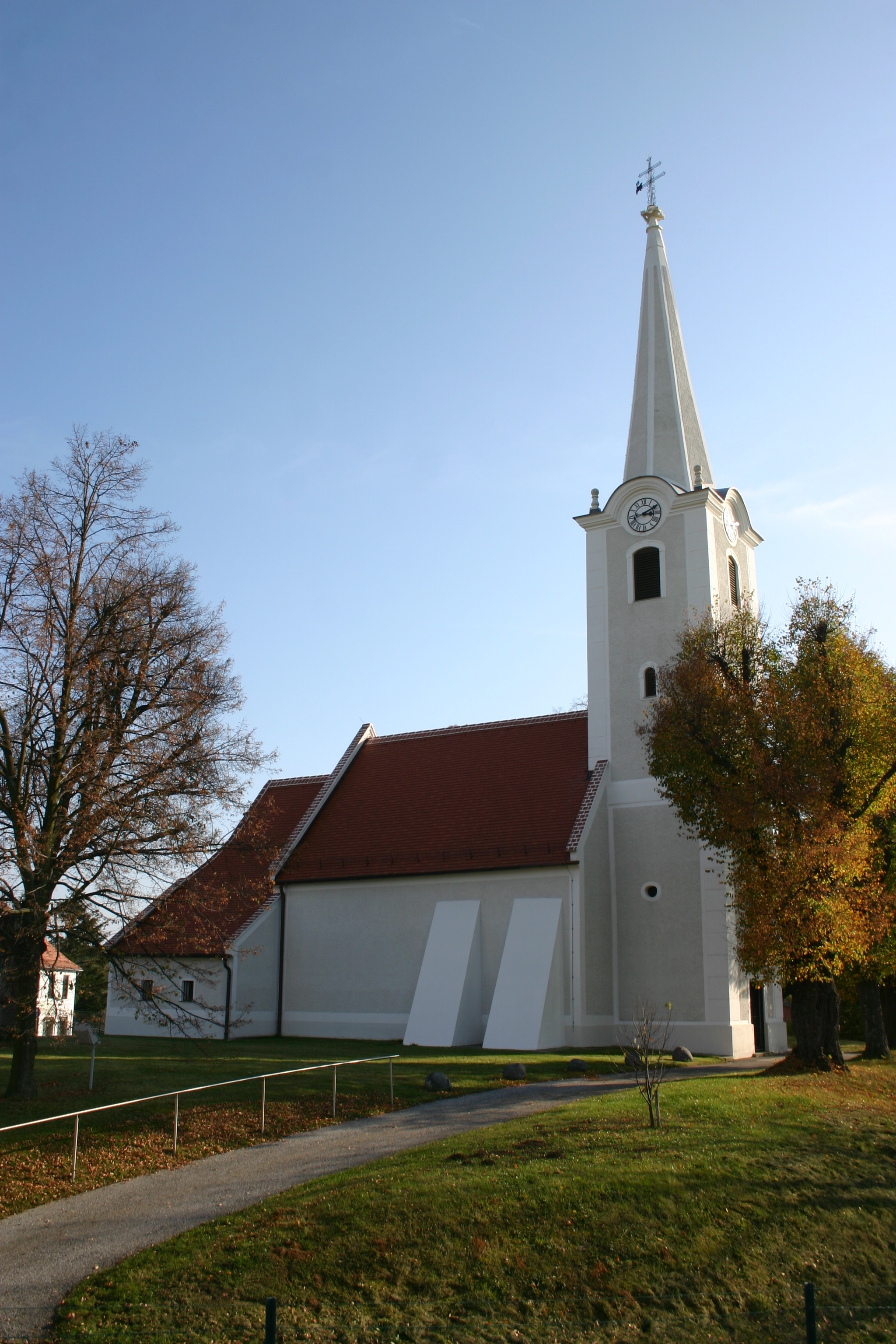 Weppersdorf römisch-katholische Pfarrkirche